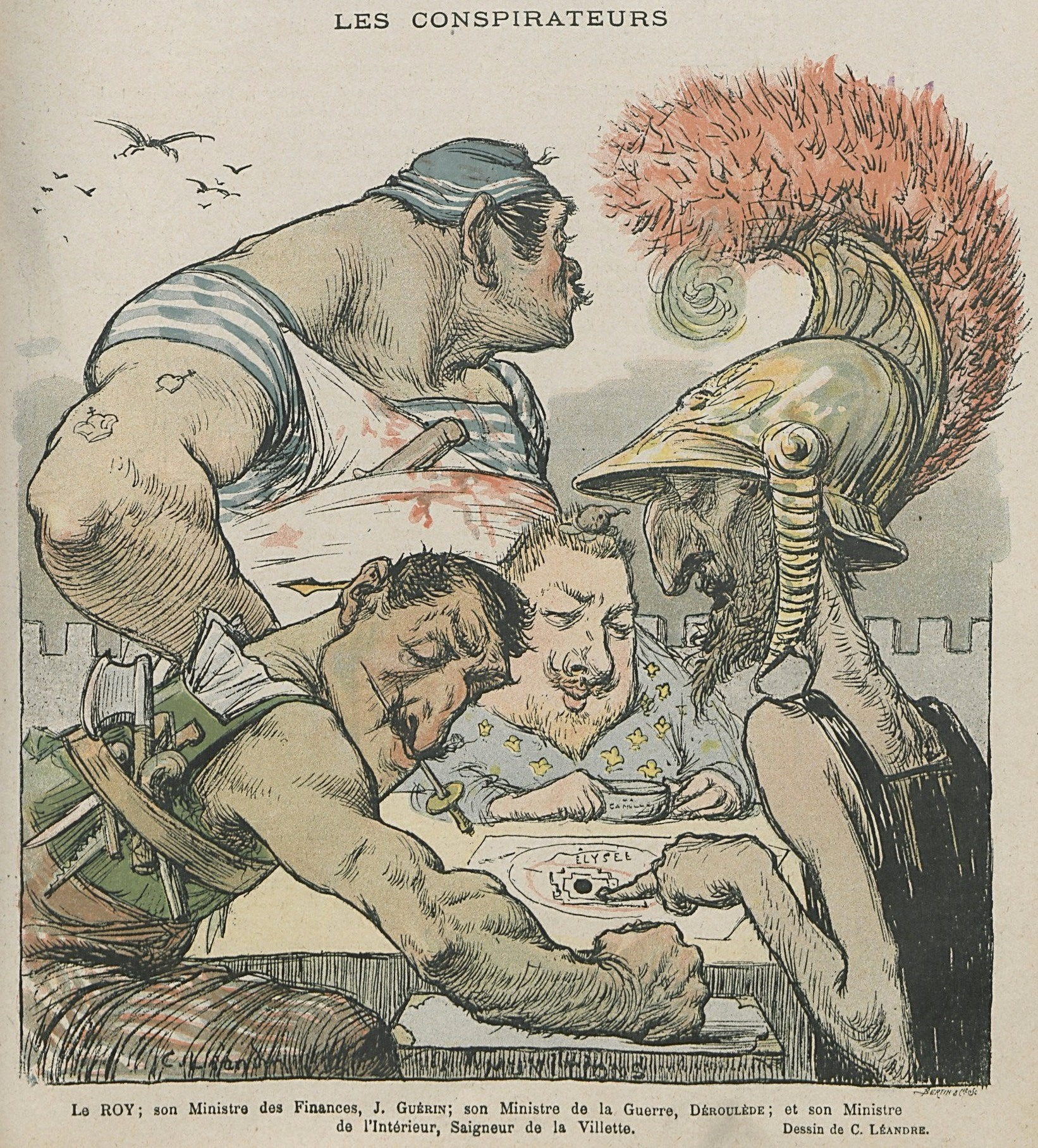 "Les Conspirateurs", "Le Roy ; son Ministre des Finances, J. Guérin ; son Ministre de la Guerre, Déroulède ; et son Ministre de l'Intérieur, Saigneur de la Vilette".